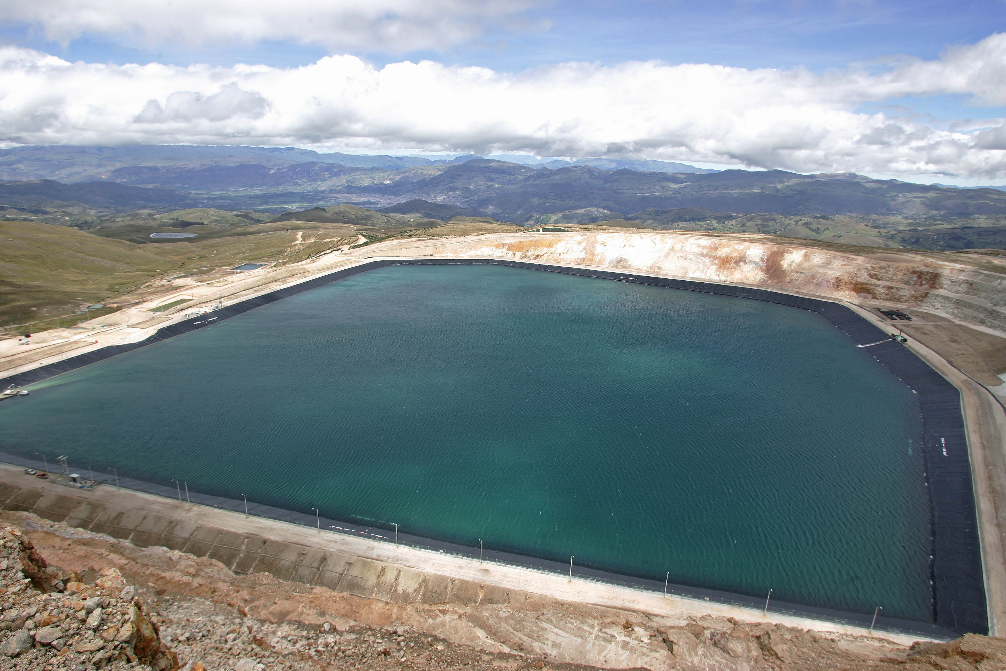 Reservorio San José, en la zona de operaciones de Yanacocha - Cajamarca